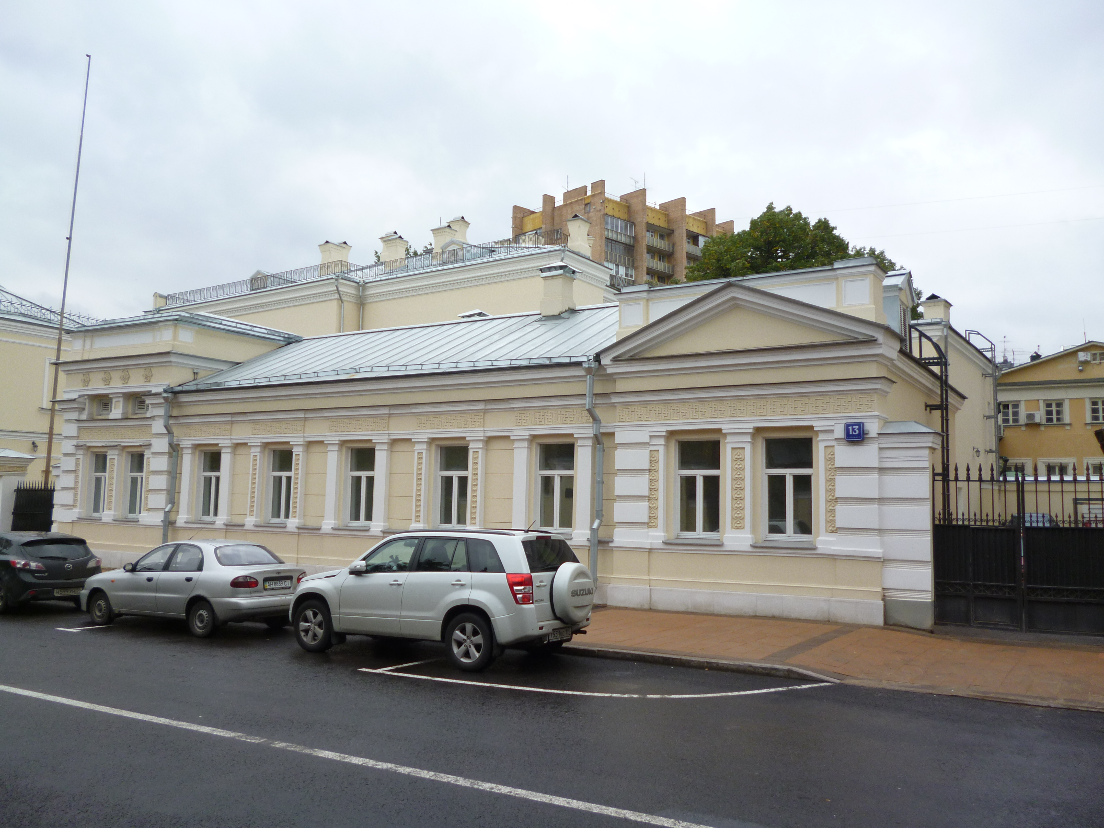 Западный флигель: Никитская М. ул., дом 13, строение 3, Пресненский, Центральный округ, Москва